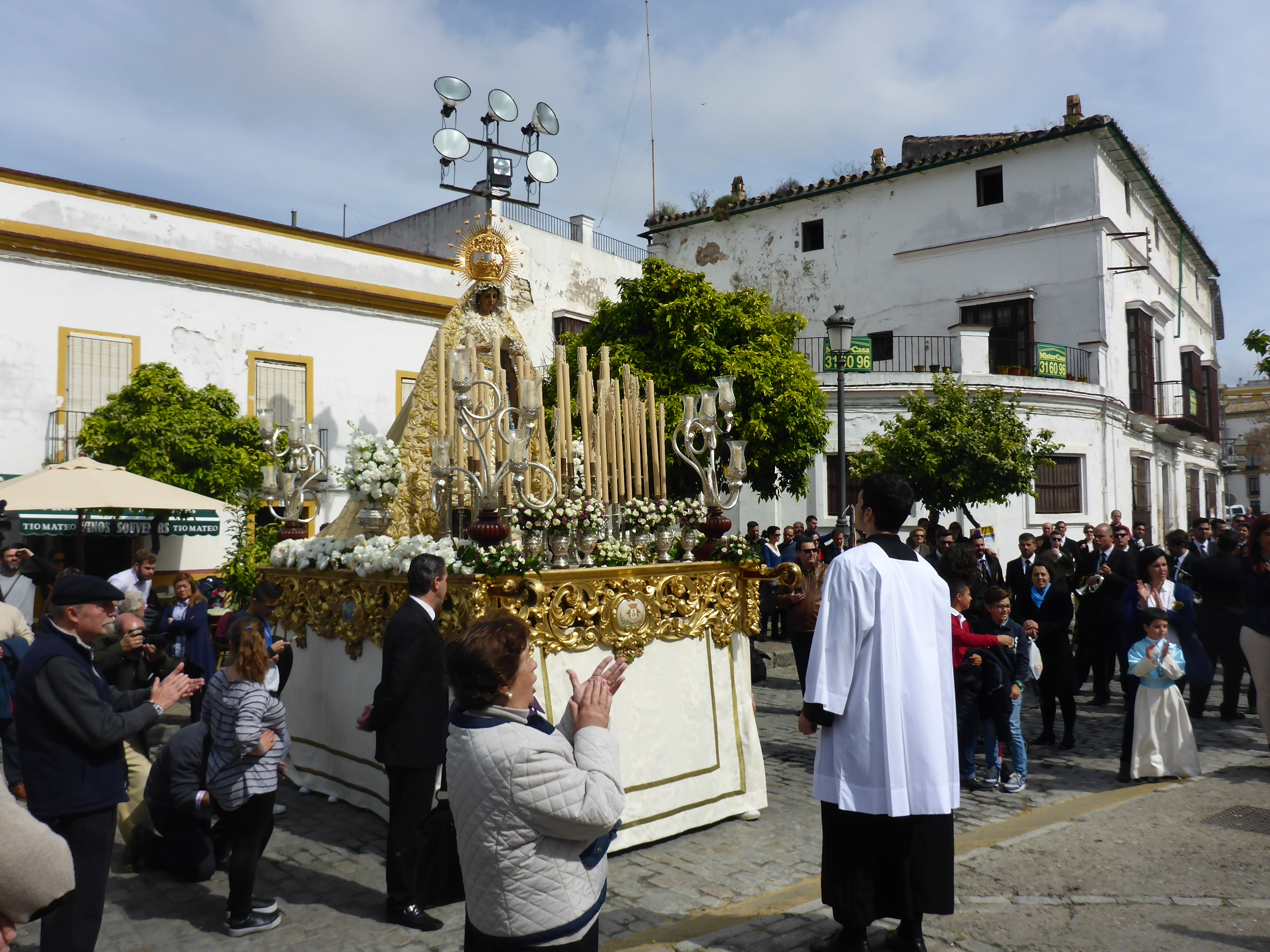 Hermandad del Resucitado (Jerez) This is a photography of a Folklore festival in Spain (Wikidata id Q6124533).